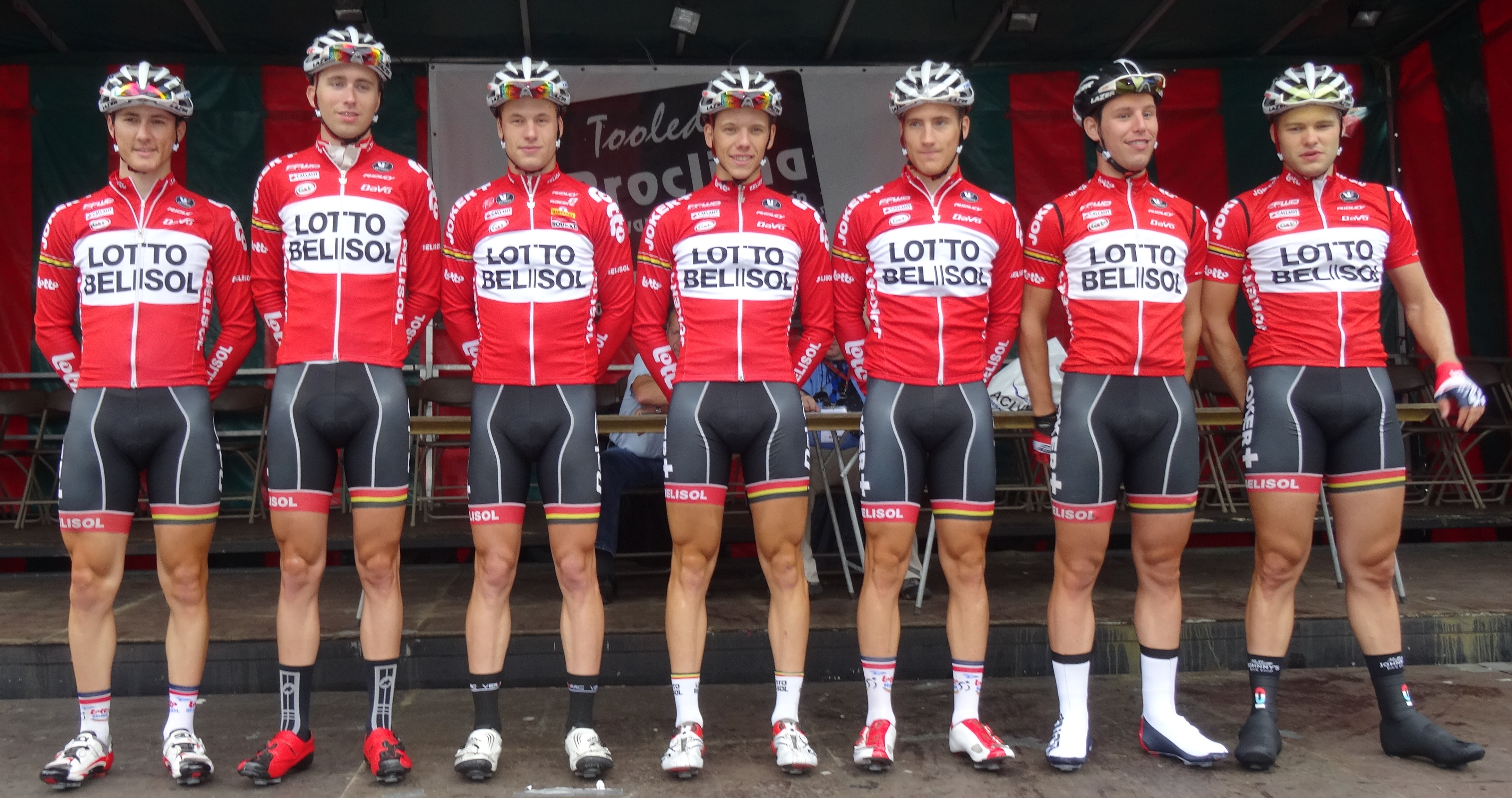 Reportage photographique réalisé le dimanche 10 août à l'occasion du départ et de l'arrivée de la Flèche du port d'Anvers 2014 à Merksem (Anvers), Belgique.